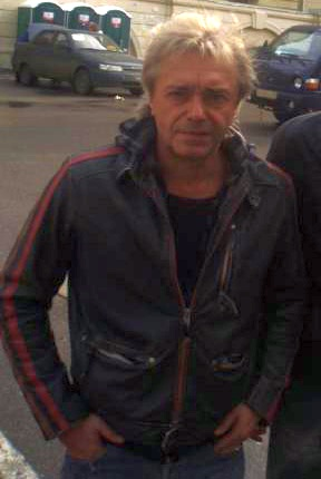 Константин Кинчев после тура по Украине Санкт-Петербург Витебский вокзал